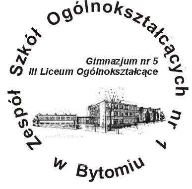 Logo ZSO1 Bytom